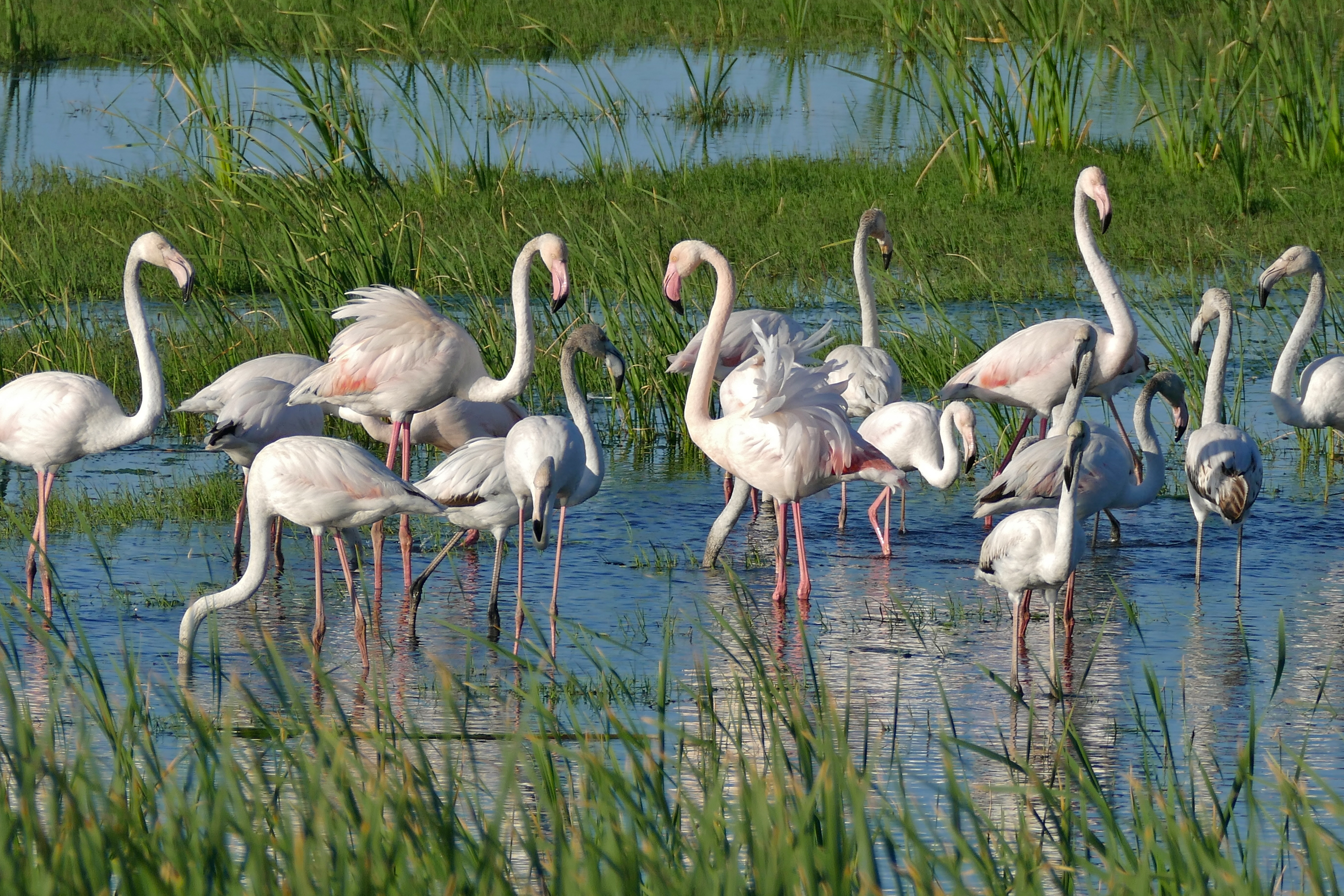 Aguait del Matar, Estanys del Matar, Los Aiguamolls del' Empordà, Castelló d'Empúries, Catalunya, SPAIN